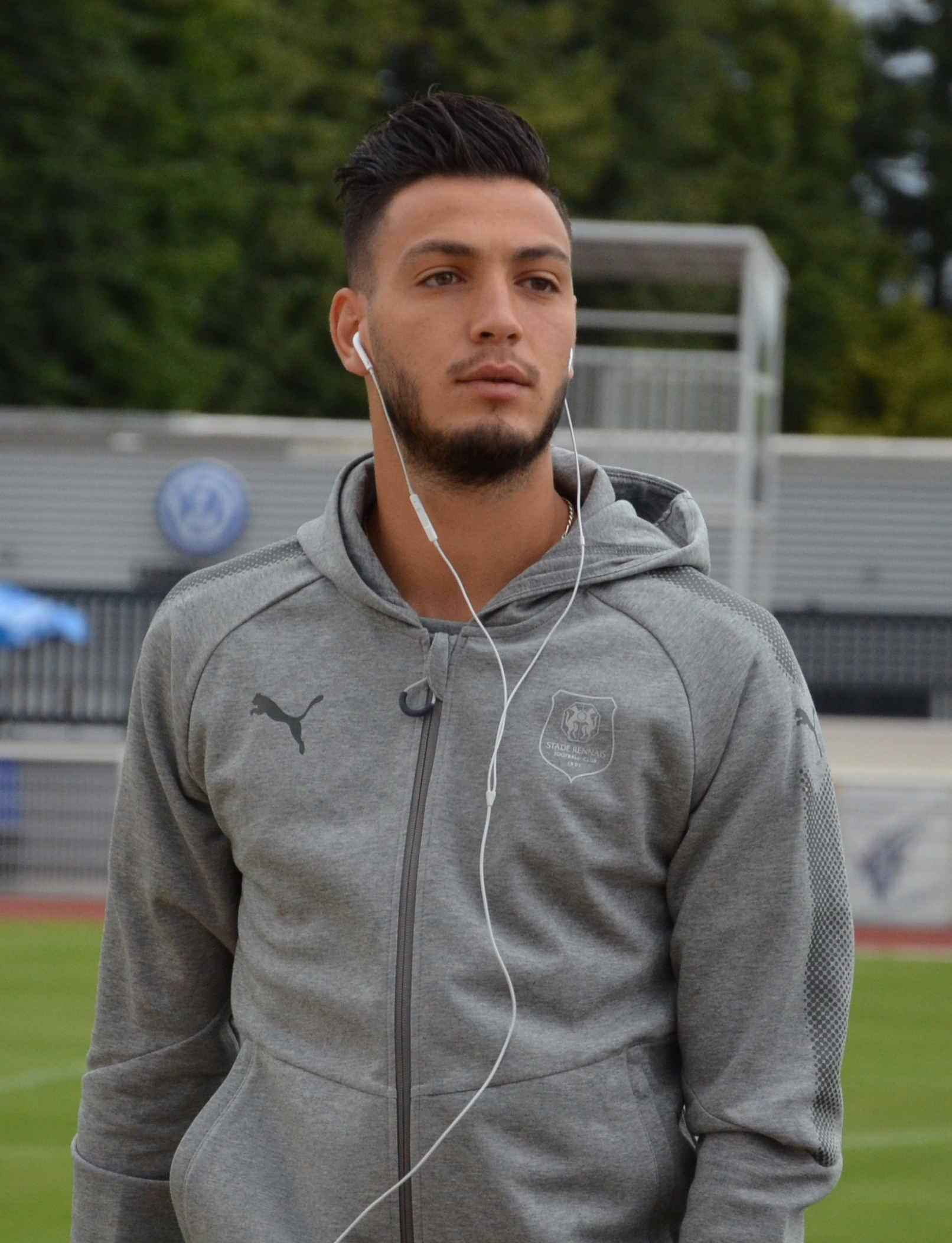 Photographie prise lors du match opposant le Stade rennais au SM Caen en match amical au stade Pierre-Compte de Vire le 22 juillet 2017. Ici, Ramy Bensebaini.